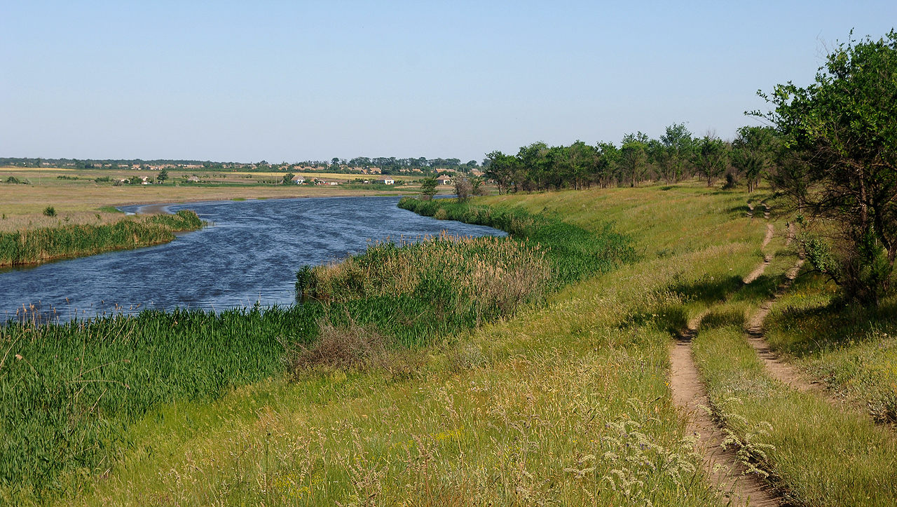 Вид с реки Малый Утлюк на село Шелюги Акимовского района Запорожской области